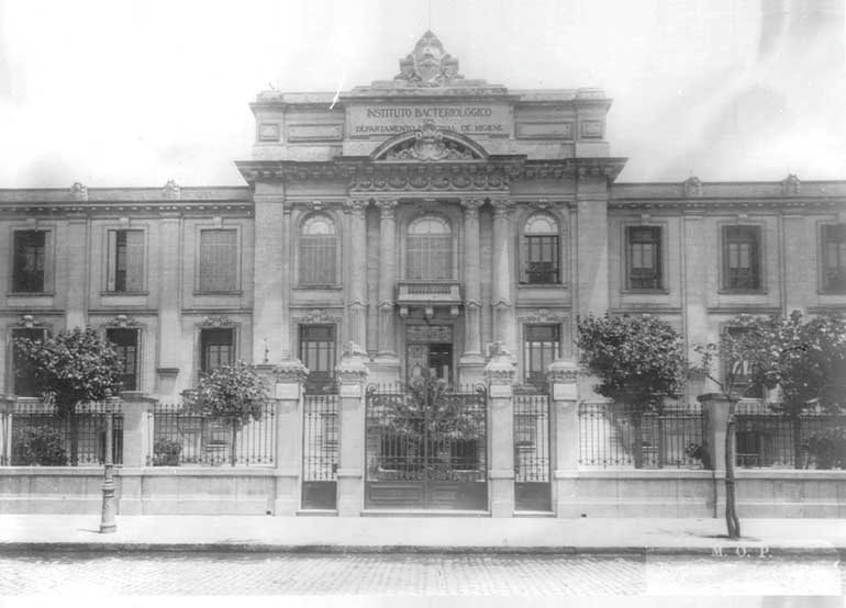 Fachada principal del Instituto Bacteriológico Argentino, hoy conocido como Administración Nacional de Laboratorios e Institutos de Salud (ANLIS) “Dr. Carlos Malbrán”.